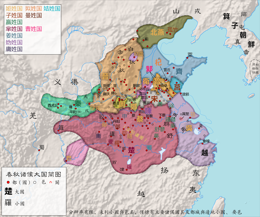 春秋